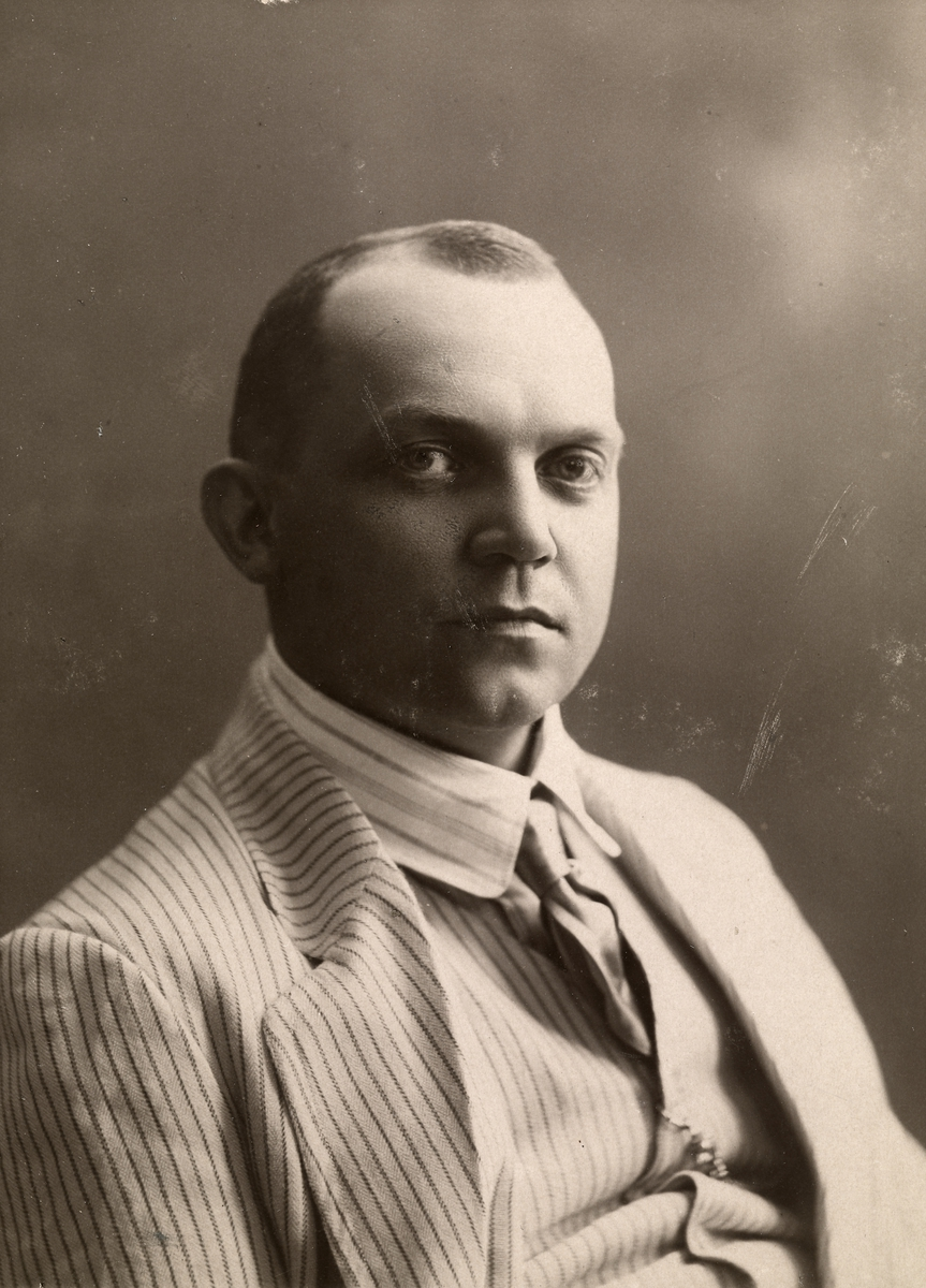 Lauritz Stub Wiberg (1908), portrett, mann, skuespiller, brystbilde.